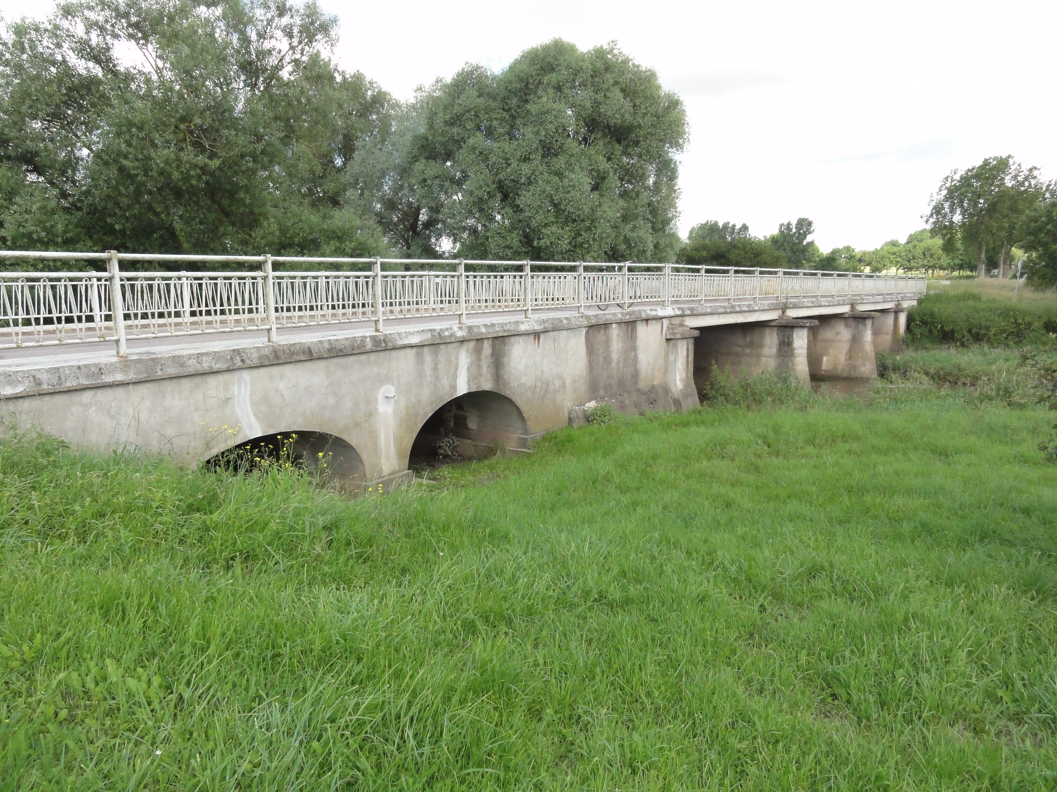 Hénamémil (M-et-M) pont du Sânon